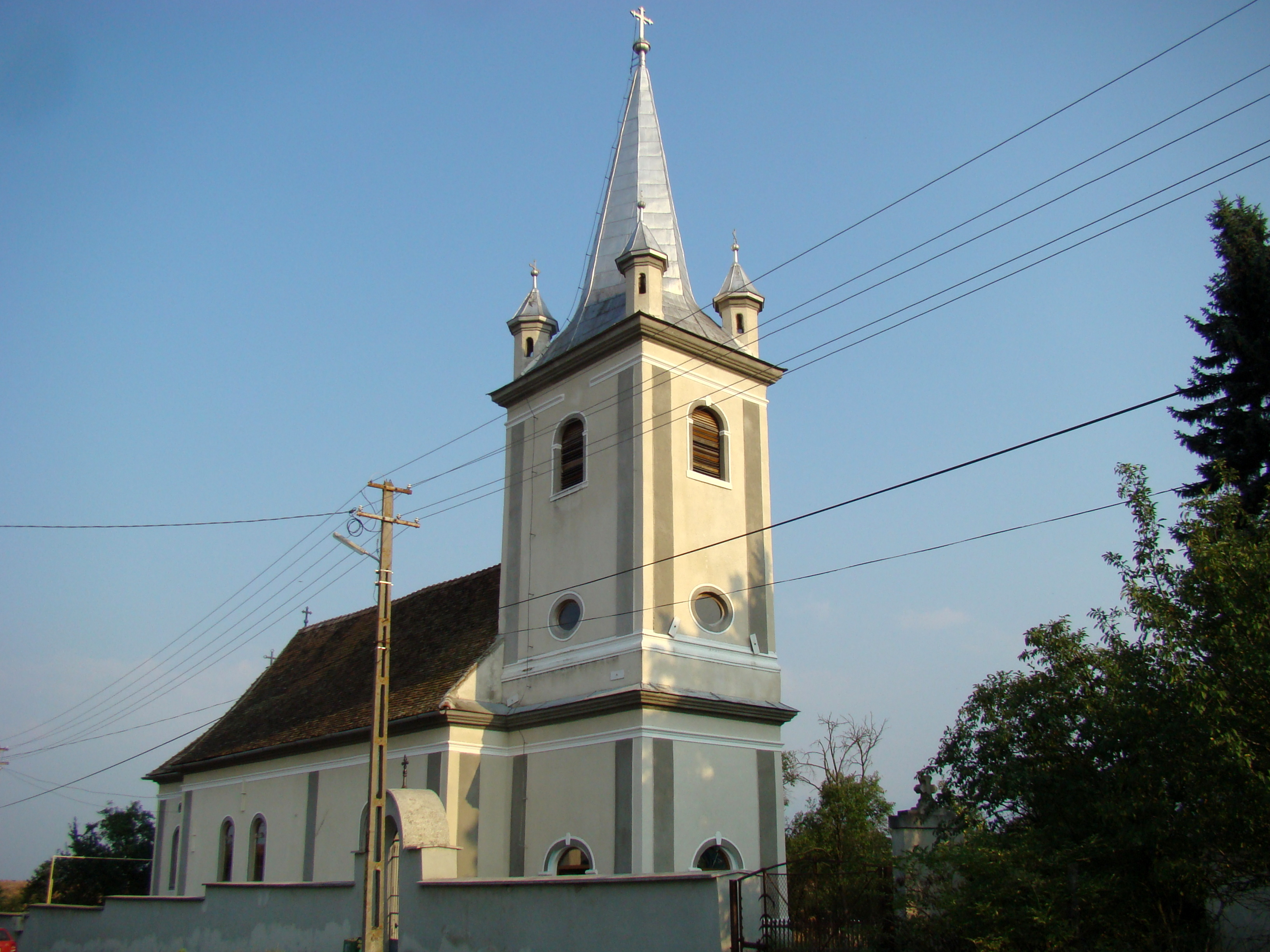 Biserica "Botezul Domnului" din Săcădate, oraș Avrig, județul Sibiu